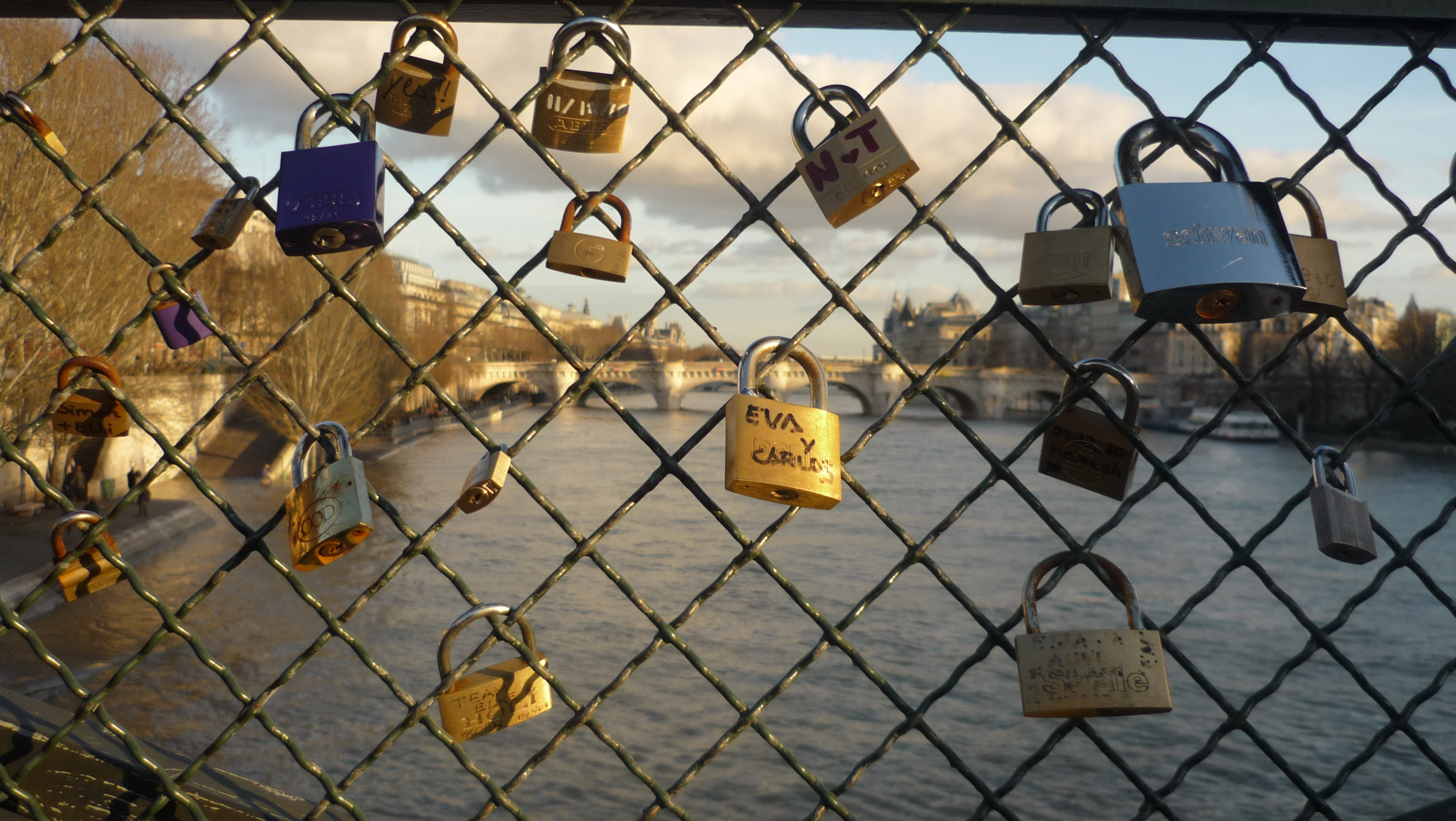 Cadenas d'amour sur le pont des Arts à Paris